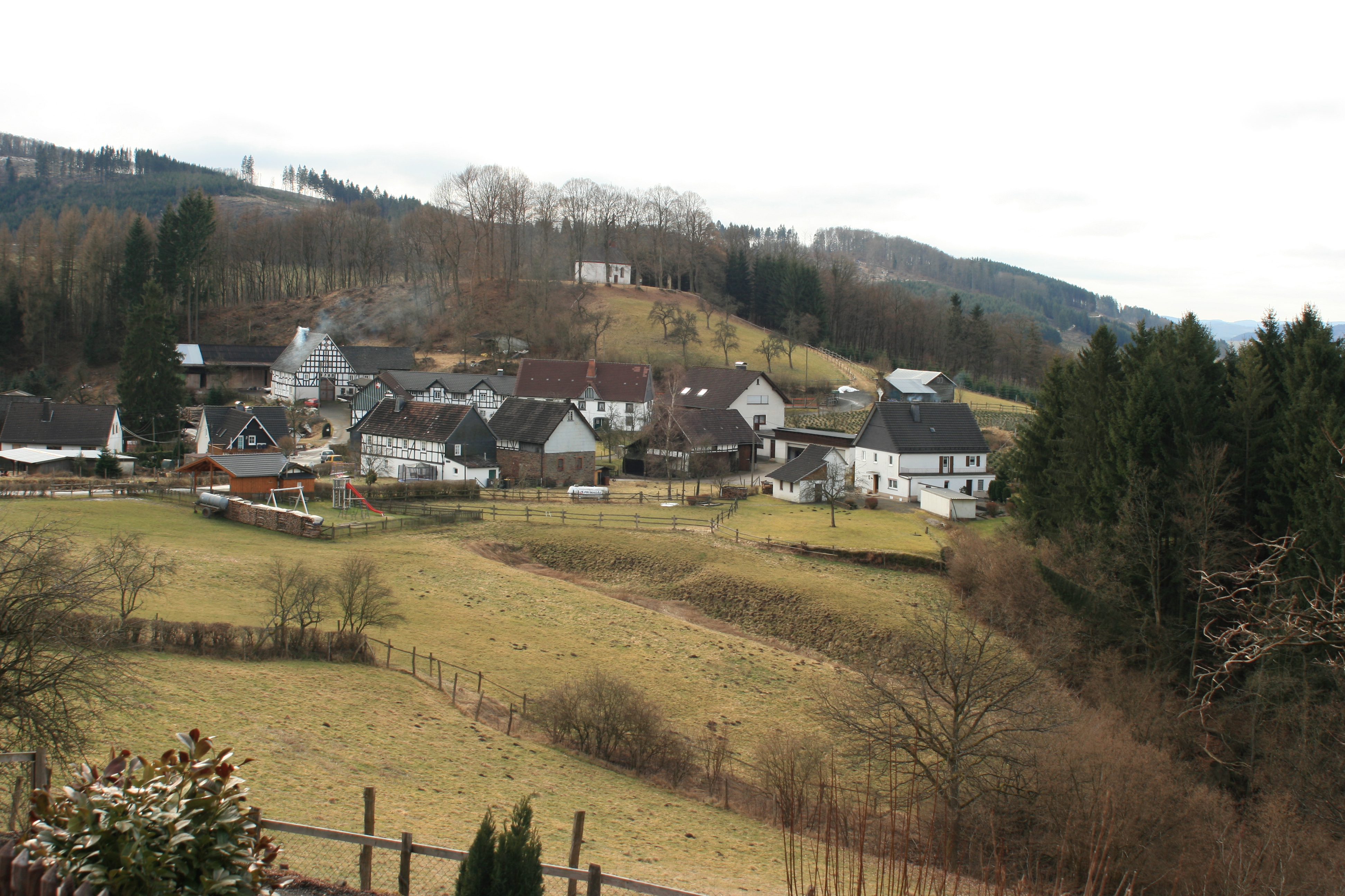 Oedingerberg bei Oedingen (Lennestadt)